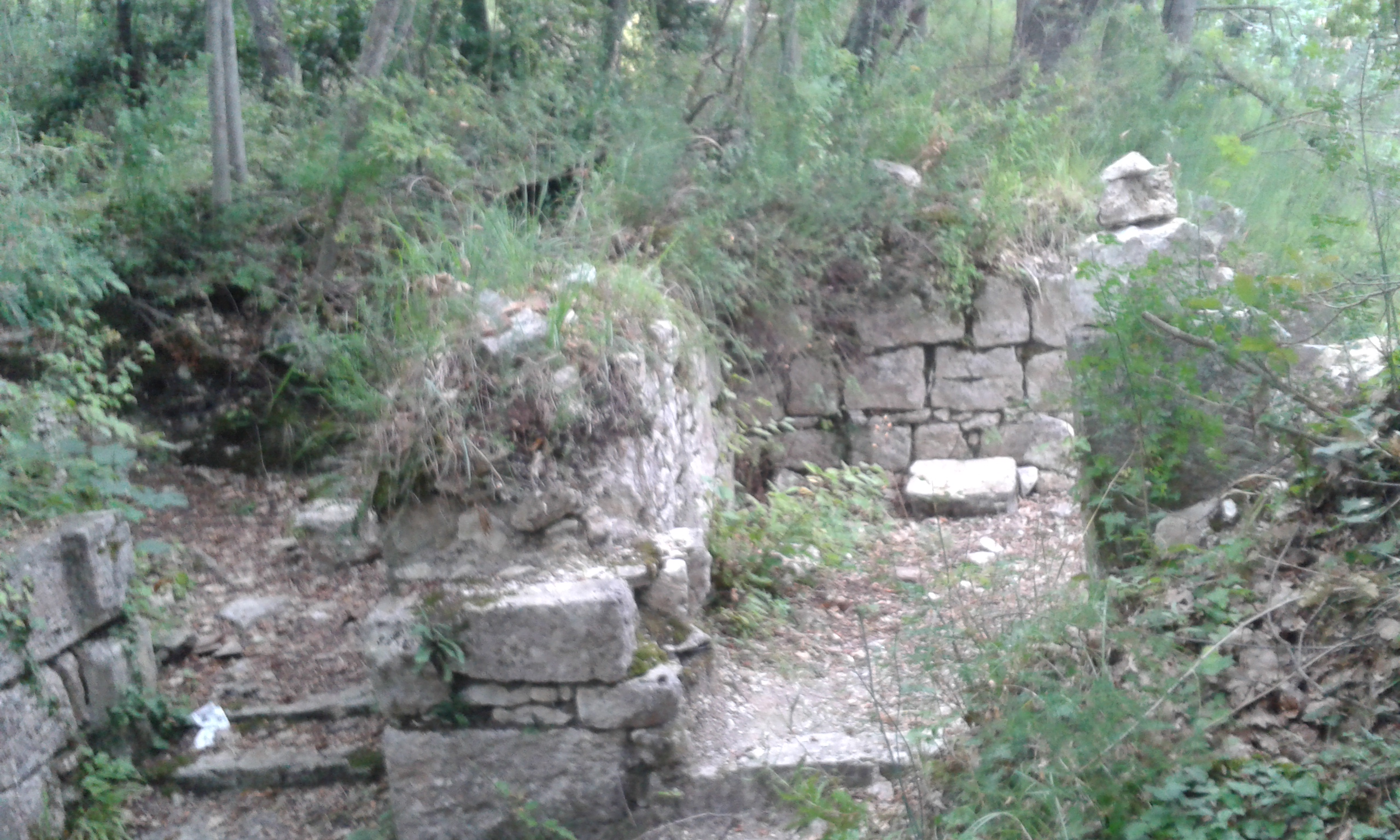 Rovine del Monastero di San Lorenzo alle Piagge, presso Colle S.Marco, Ascoli